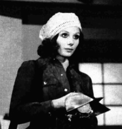 Italian actress Paola Pitagora